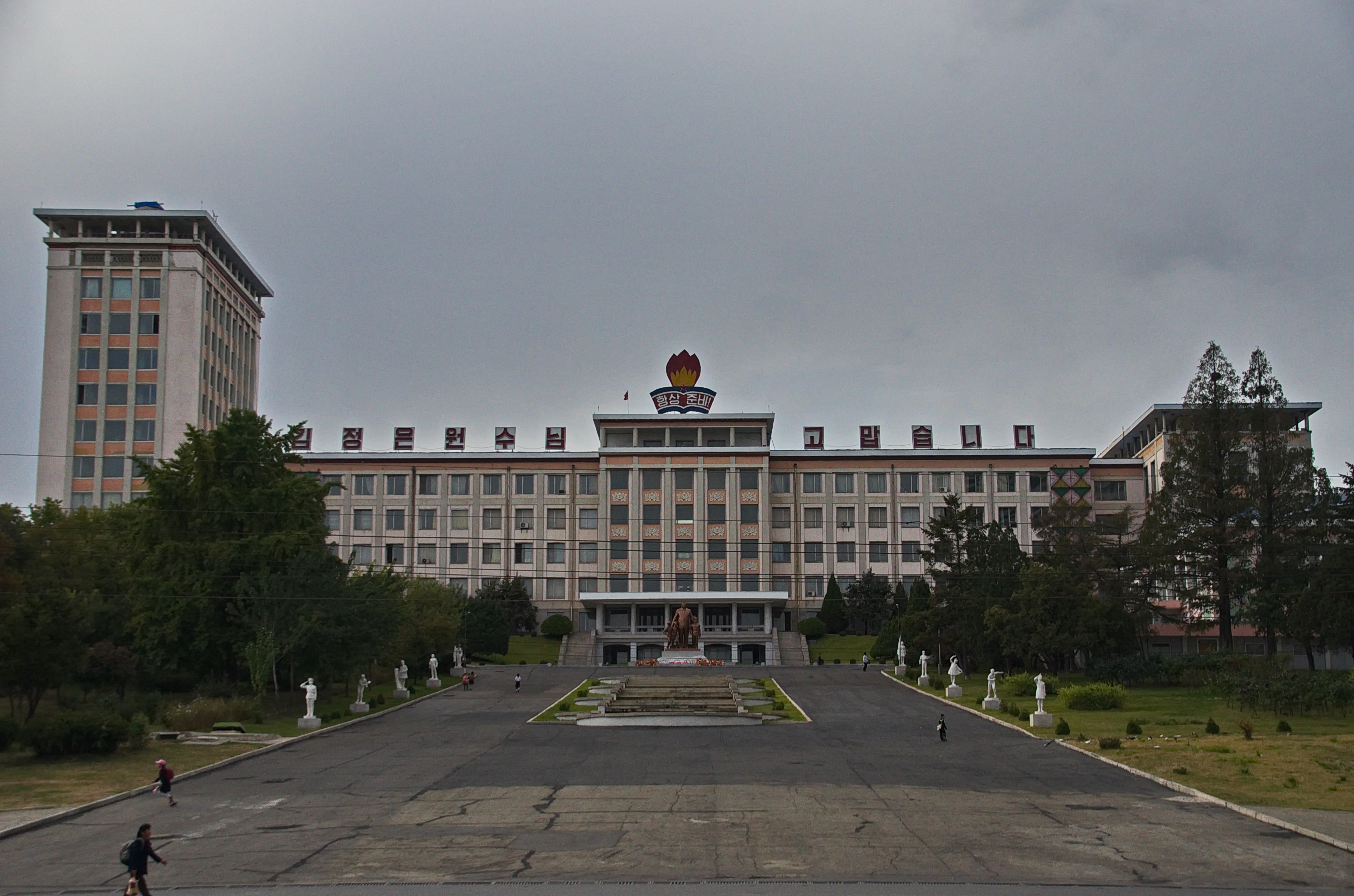 Nordkorea 2015 - Pjöngjang